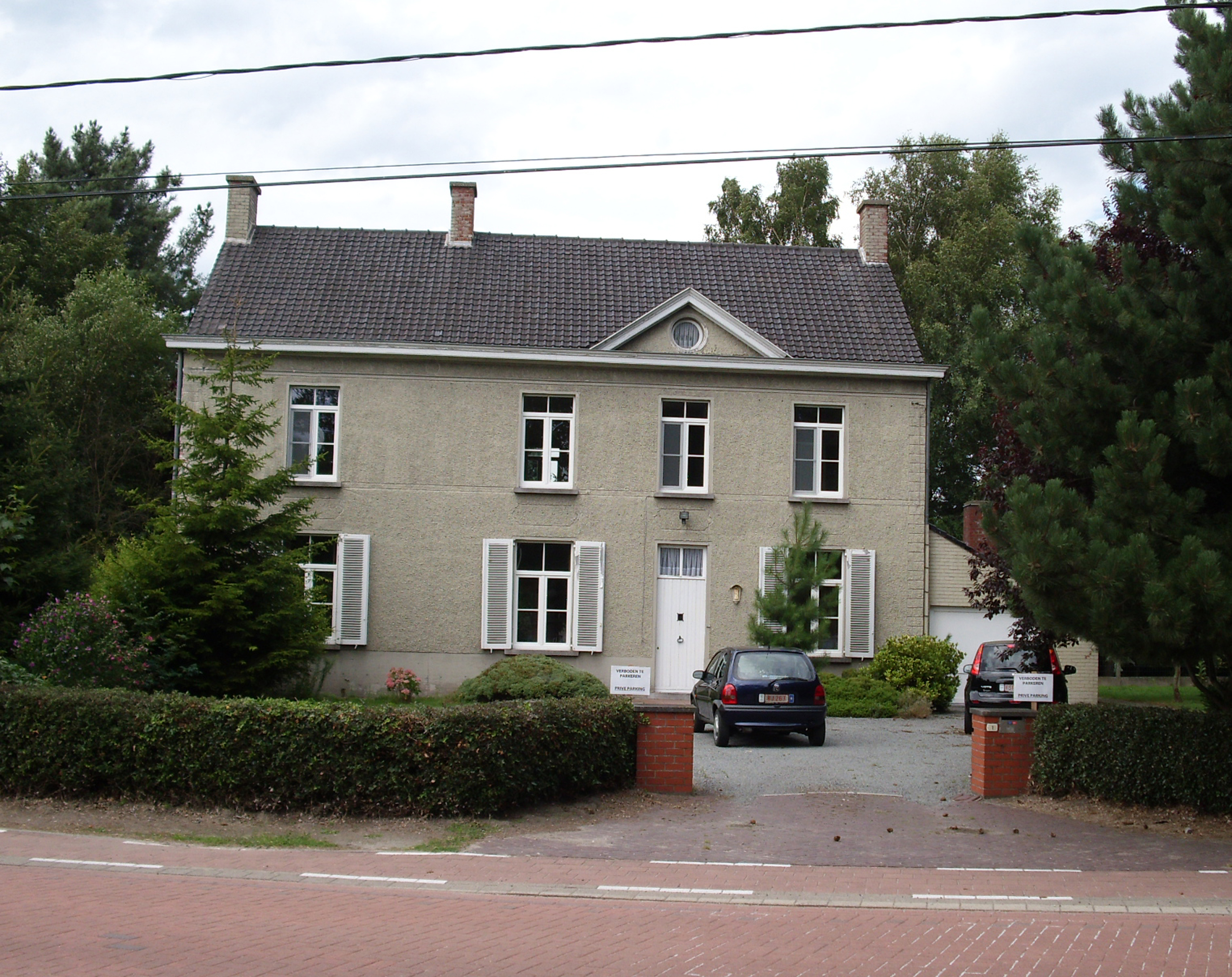 Pastorie Wippelgem - Evergem - Oost-Vlaanderen - Vlaanderen - België